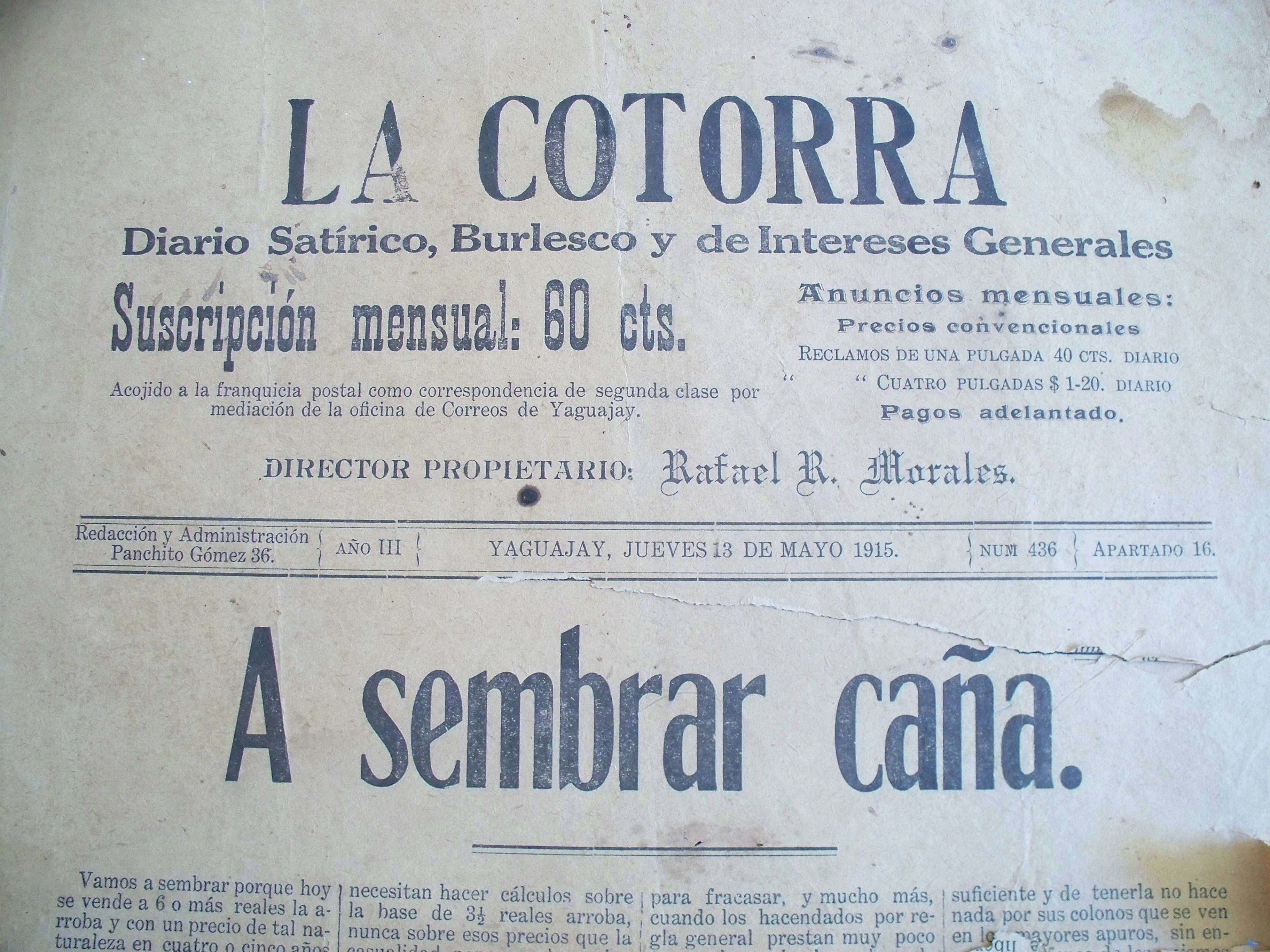 Fragmento de portada del periódico "La Cotorra", Yaguajay, 1915